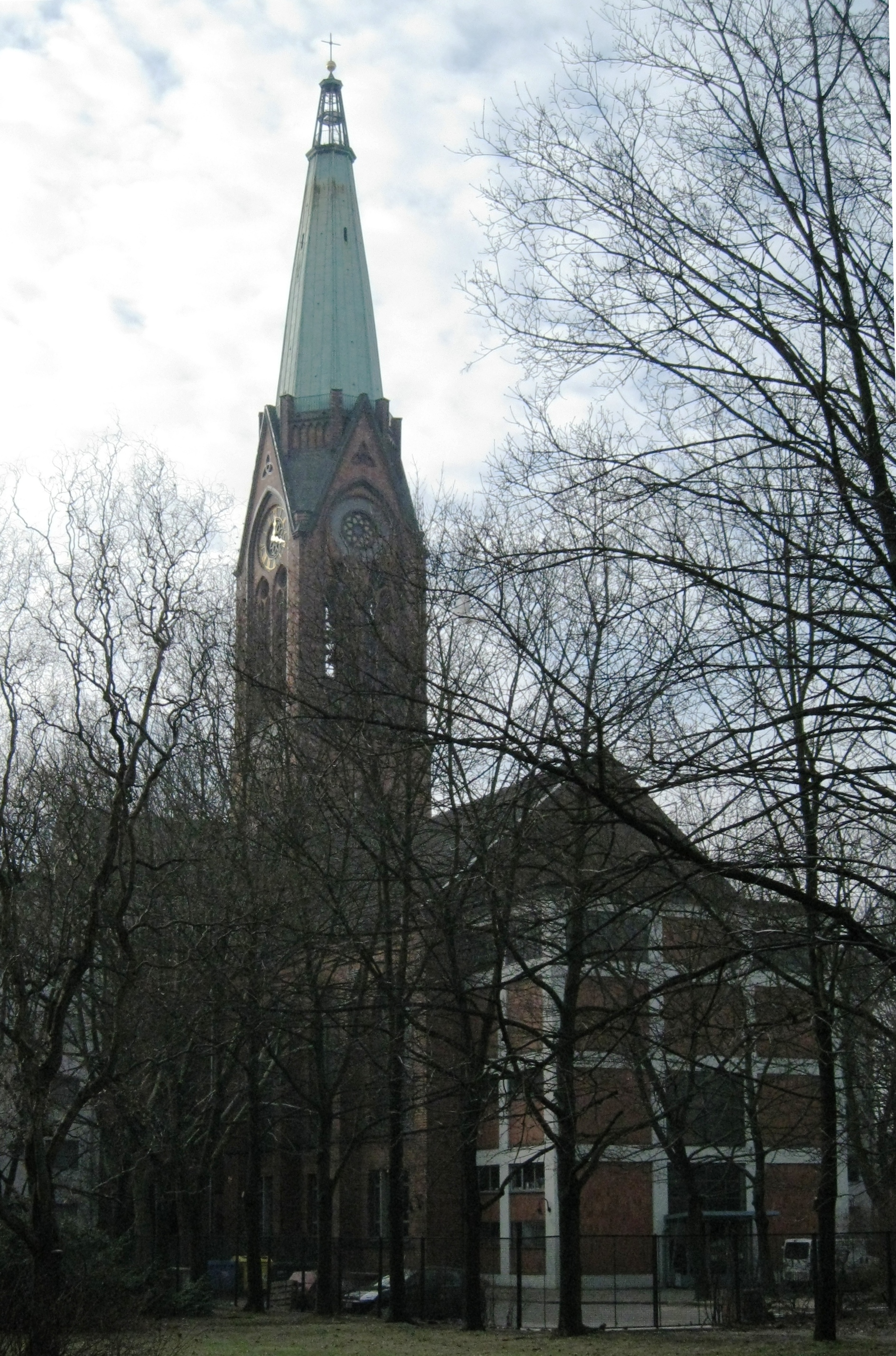 Hofansicht der St.-Simeon-Kirche